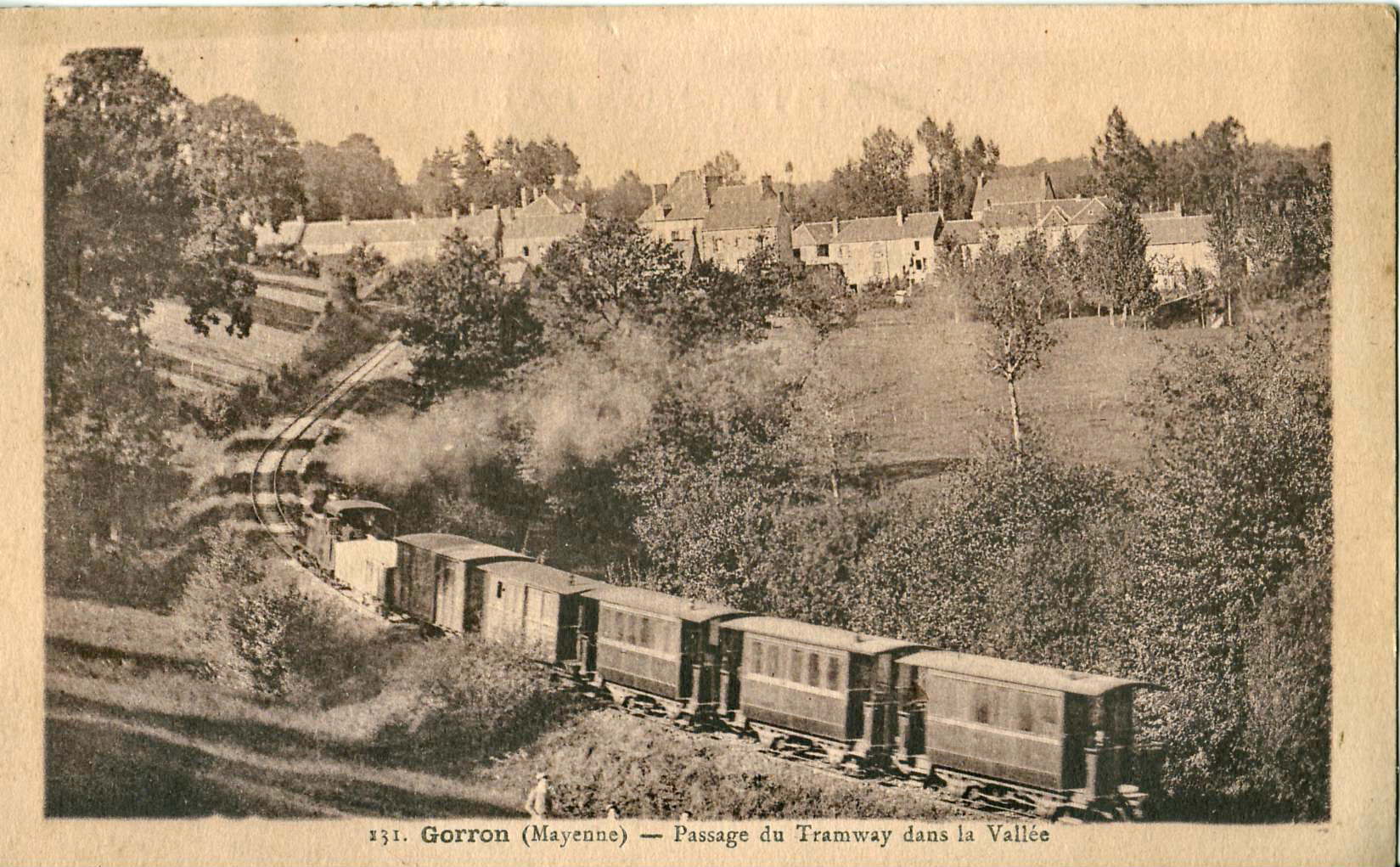 Carte postale ancienne éditée par Danvel, n°231 : GORRON - Passage du Tramway dans la Vallée